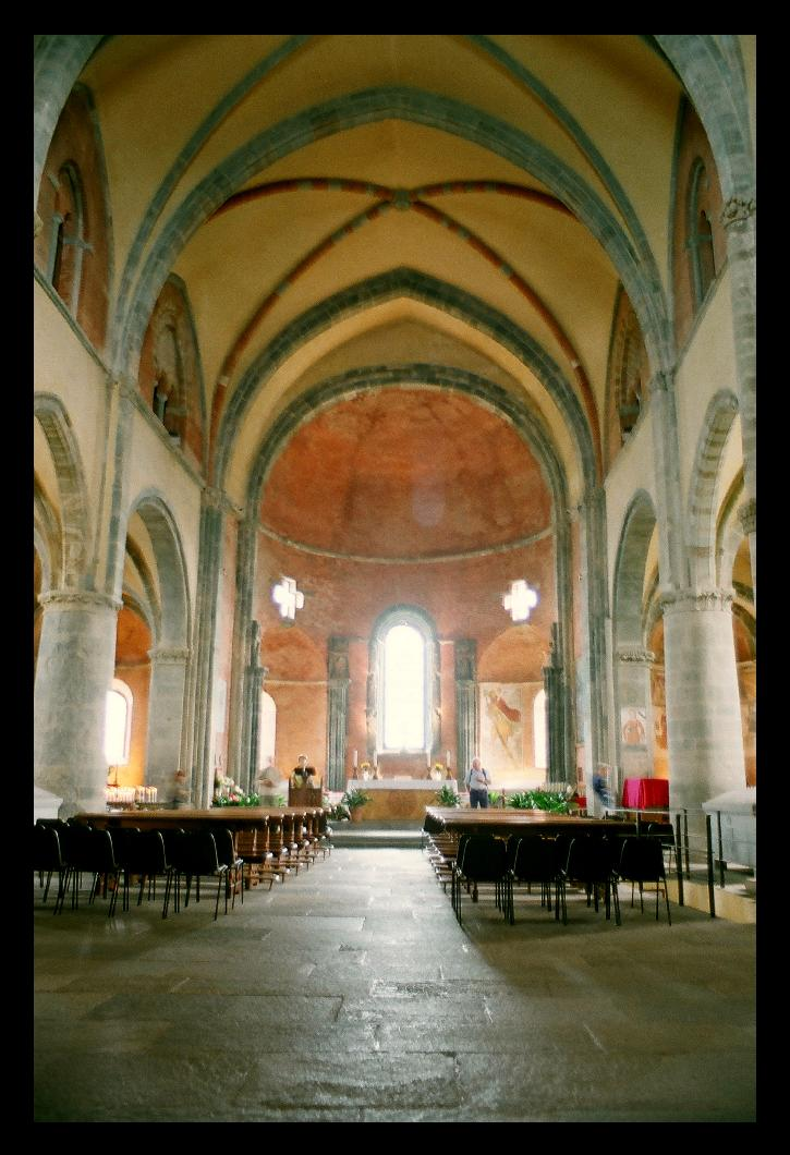 Torino, chiesa di San Michele Arcangelo, interno. (? da verificare.)